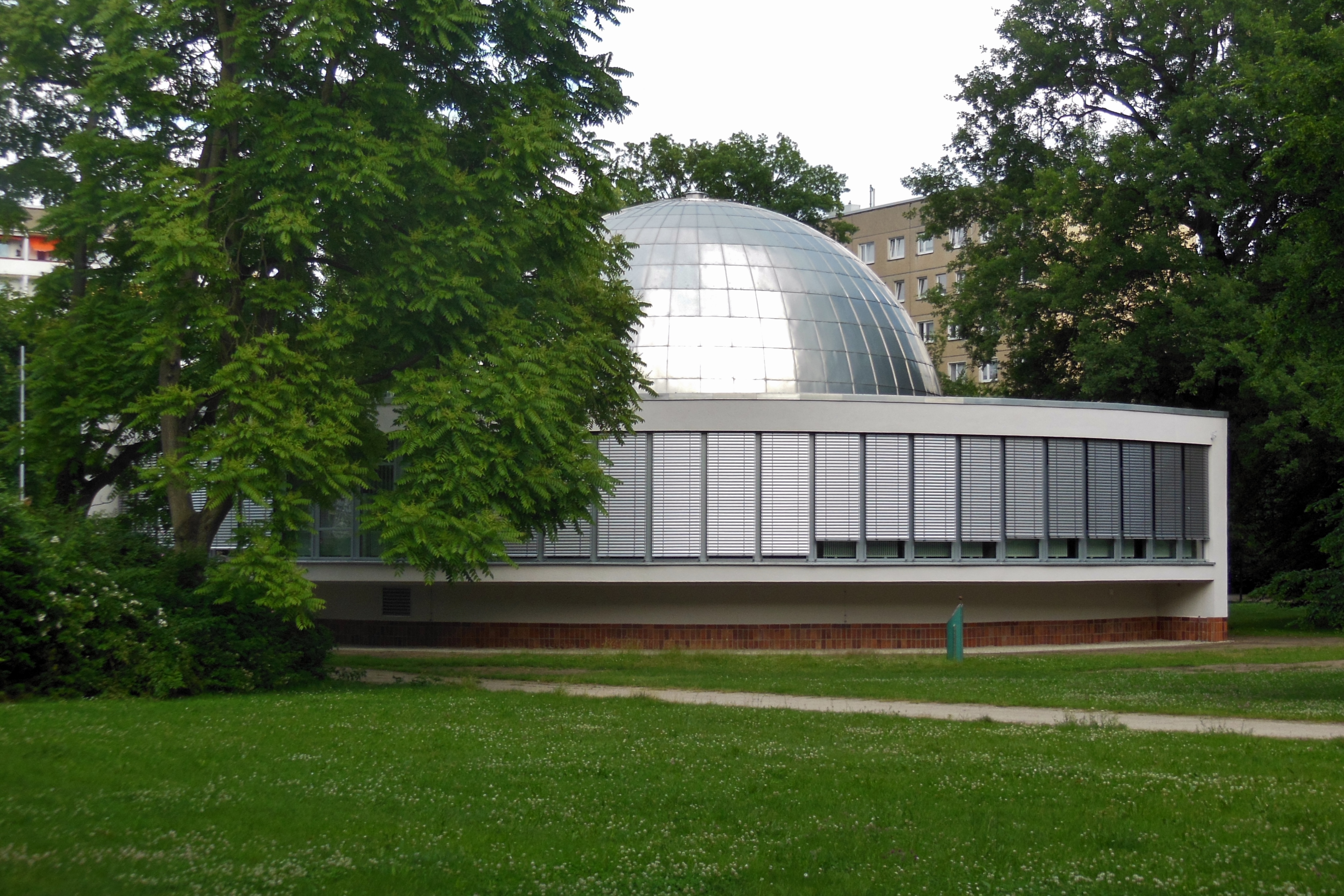 Raumflugplanetarium Juri Gagarin Cottbus; nach der Modernisierung